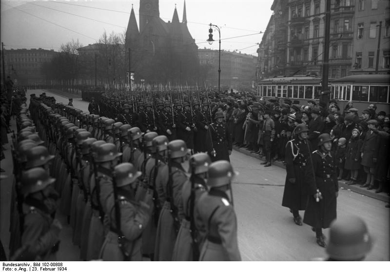 Beisetzung des SS-Gruppenführers Seidel-Dittmarsch in Berlin am 23. Februar 1934.